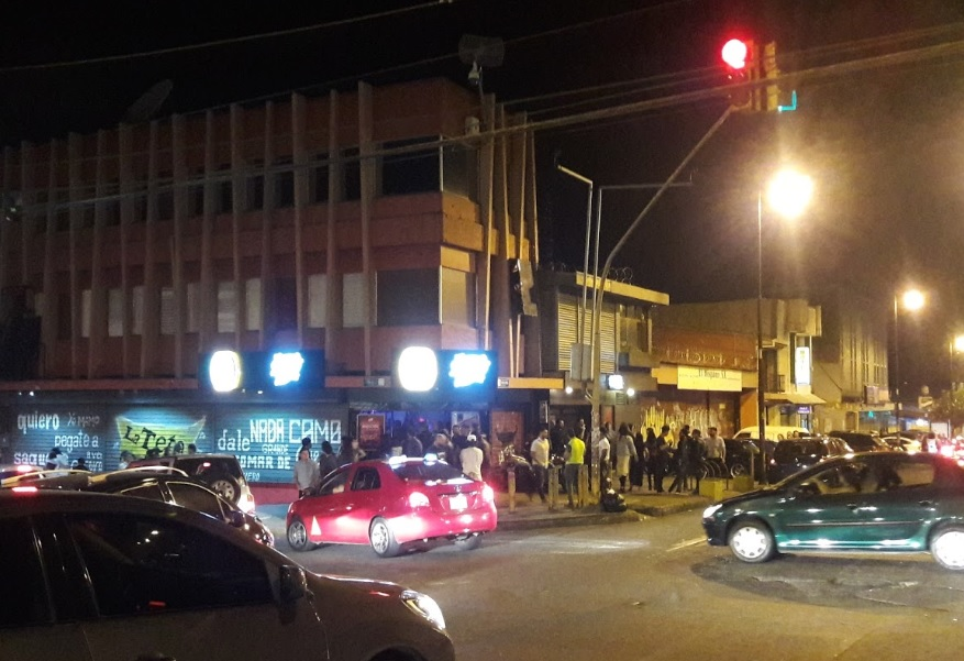 Barrio La California, en San José.